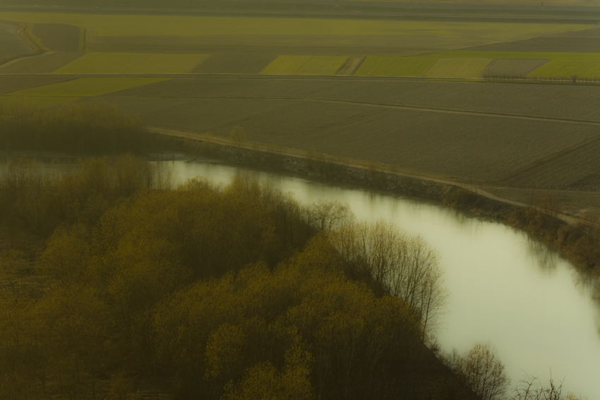 Fiume Tanaro ripreso dalla Torre di Barbaresco. Opera propria 24/03/2009 Stefano Simeone